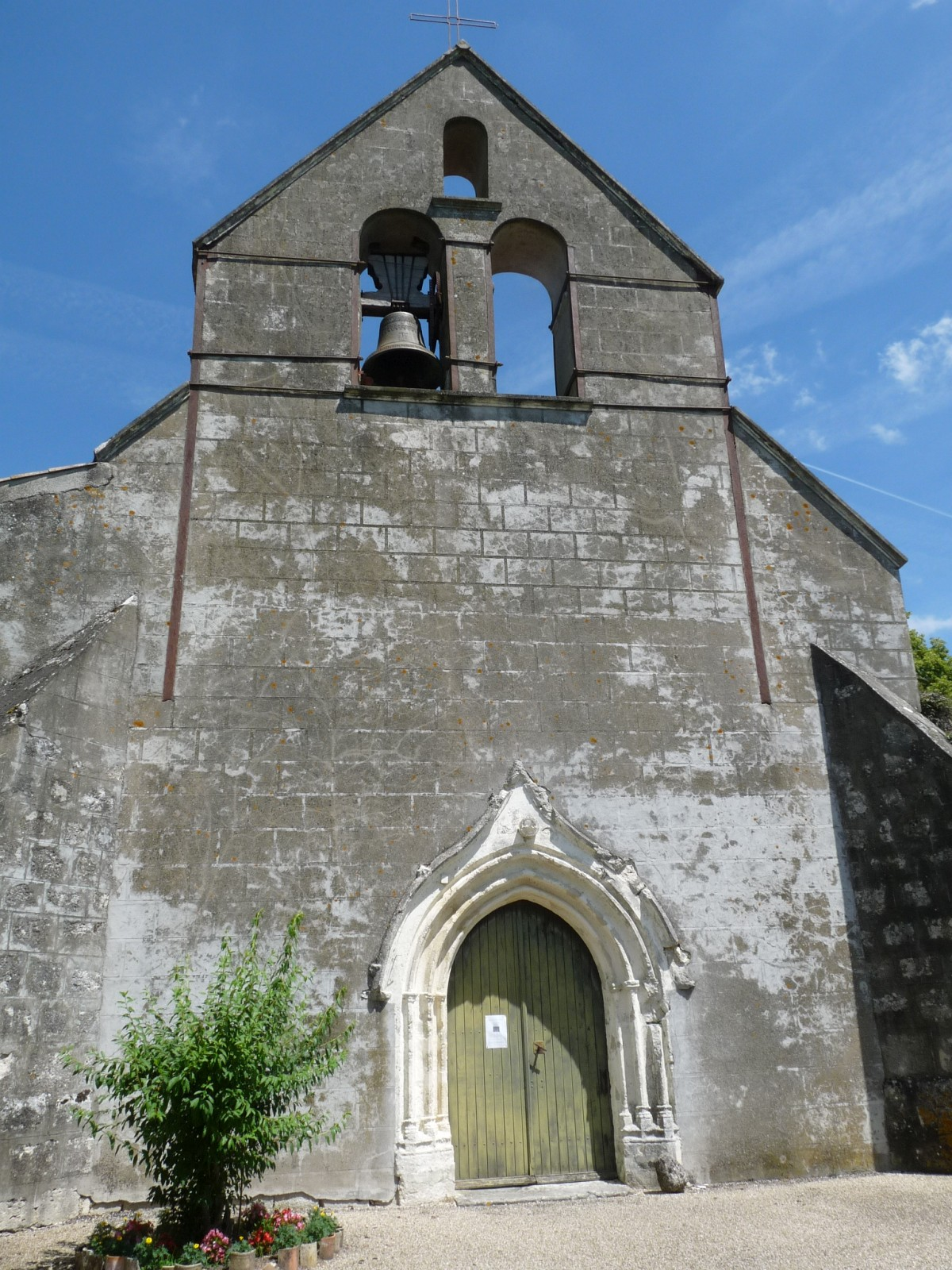 Eglise de Saint-Sernin, Lot-et-Garonne, France